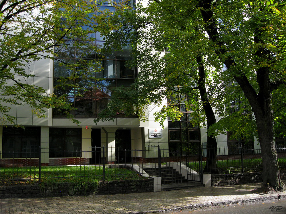 Archive